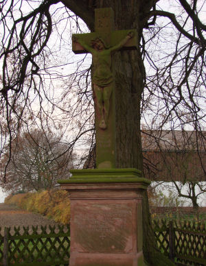 Wegekreuz an der Frankfurter Straße, Kloppenheim